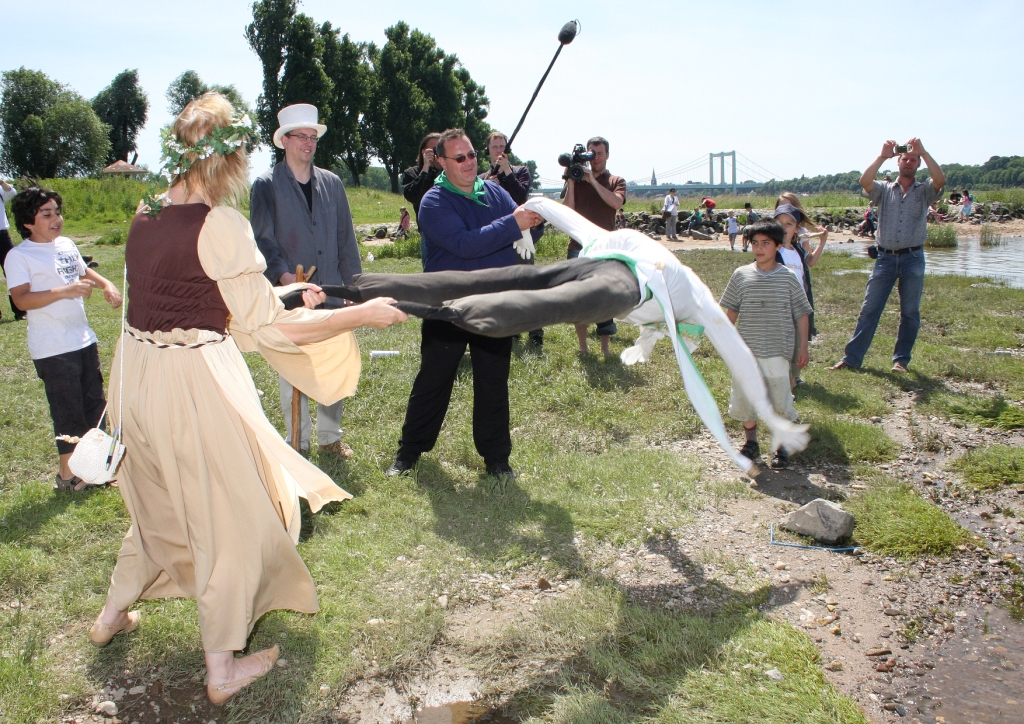 Der Nubbel wird in Köln-Poll zum Abschluss des Maifestes vom Poller Maigeloog in den Rhein geworfen (symbolisch)